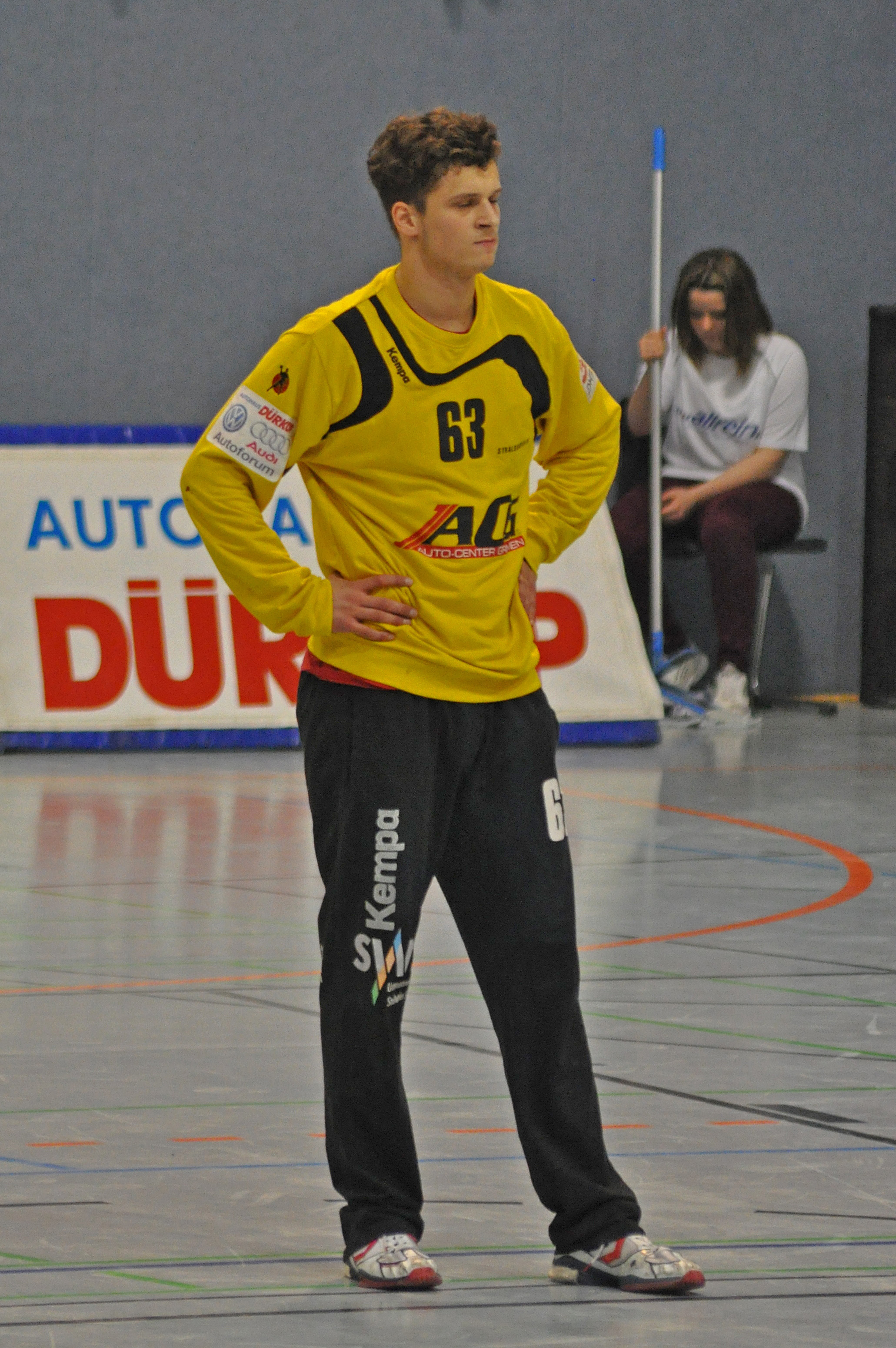 Bild aufgenommen beim Spiel in der 3. Liga (DHB) zwischen dem Stralsunder HV und dem HSV Insel Usedom am 23. März 2013 in der Stralsunder Vogelsanghalle. Das Speil endete 30:29 für den Stralsunder HV.